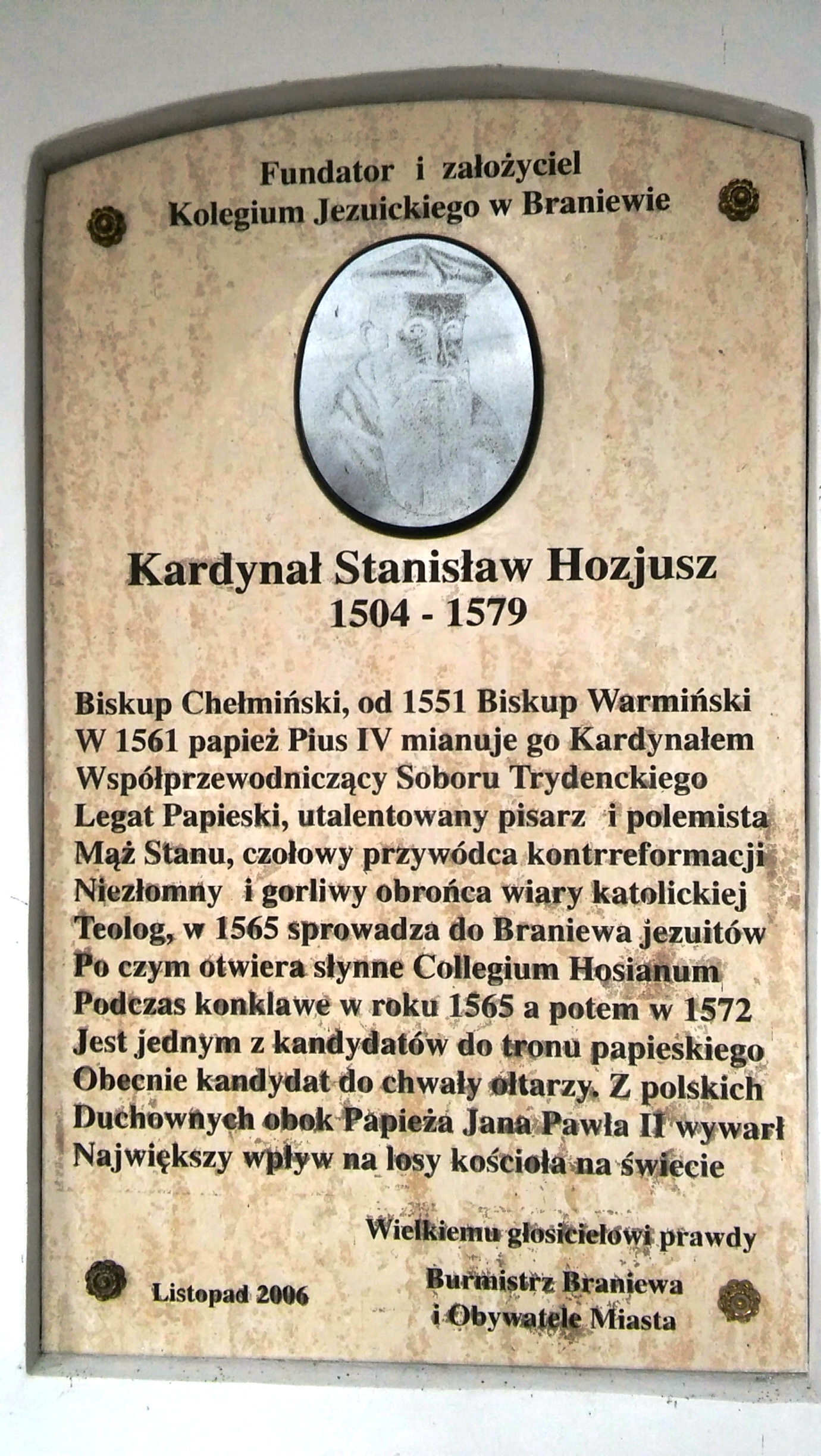 Stanisław Hozjusz Stanislaus Hosius